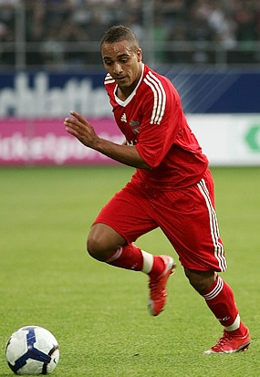 El futbolista del Llevant UE Nabil El Zhar